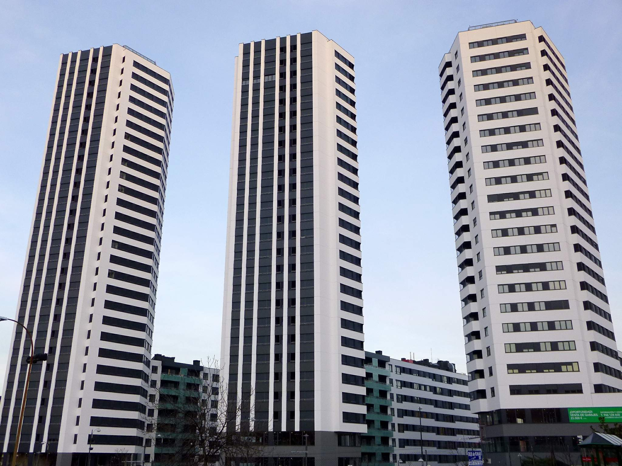 Edificios de viviendas Dorre Barriak (fotografiados el 7 de marzo de 2015)